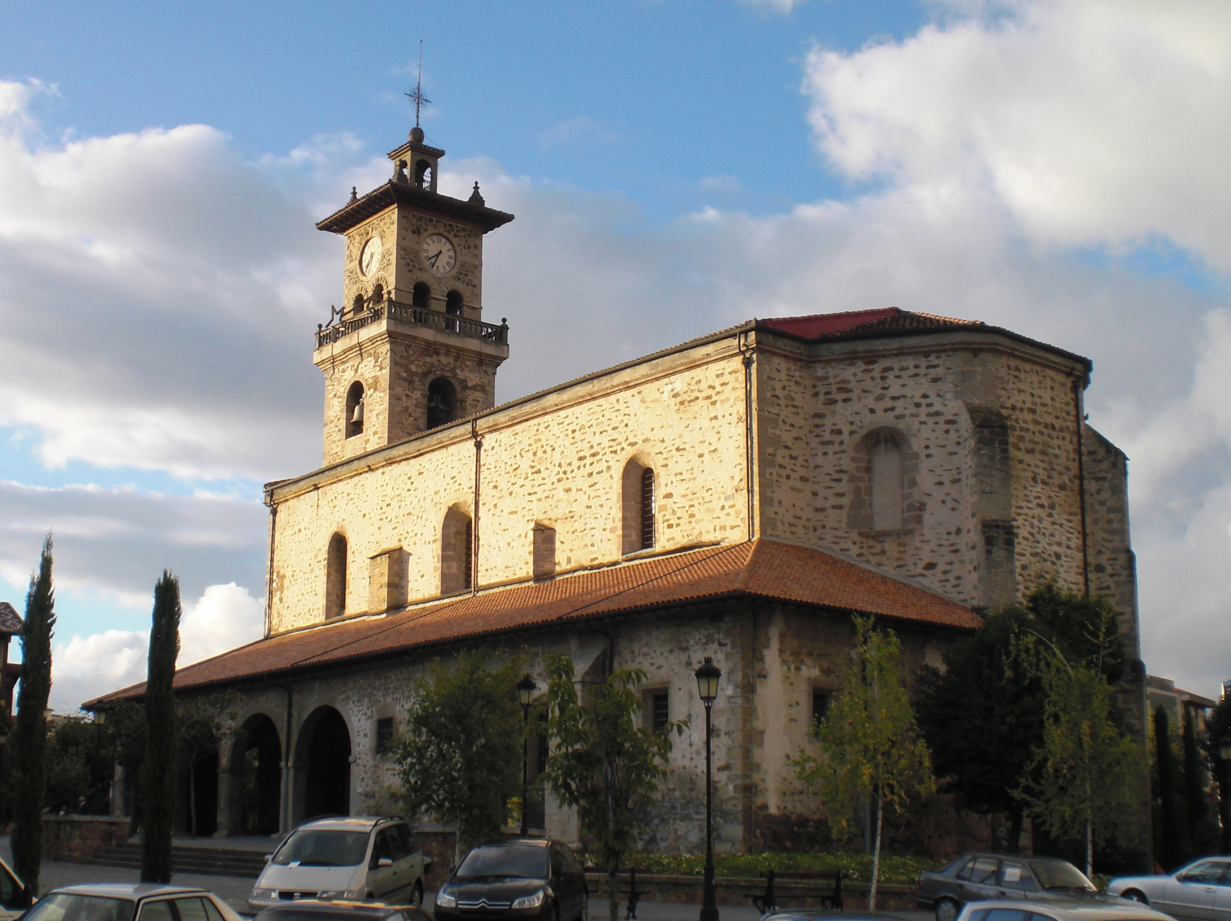 Amurrioko eliza